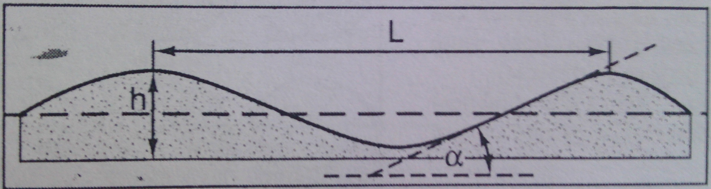 Srpski (latinica): Elementi talasa